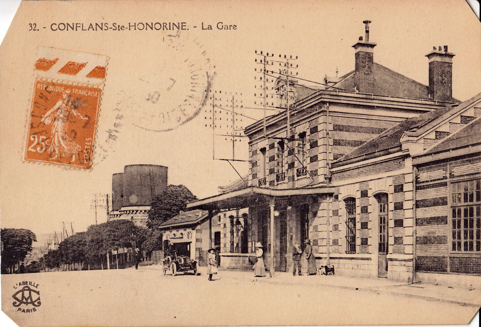 Carte postale ancienne éditée par L'Abeille à Paris, n°32 : CONFLANS-Ste-HONORINE - La Gare